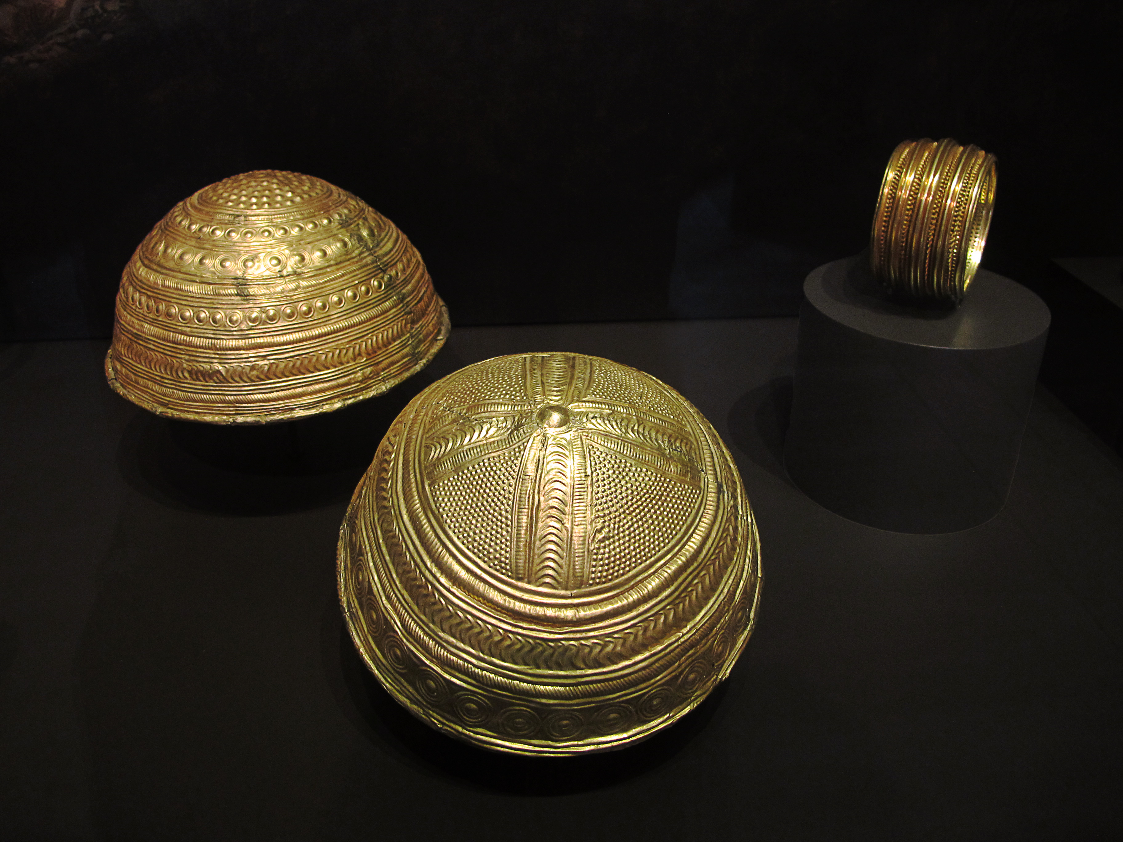 Cuencos de Axtroki son de oro con forma semiesférica acabado en un reborde curvado y que podría ser un cuenco o un casco. se encontró en Axtroki (Guipúzcoa). Recientemente se ha propuesto que ambas piezas podrían ser en realidad cascos o casquetes ceremoniales empleados en algún culto o ceremonia. Su decoración geométrica se ha querido ver como un símbolo del sol. El Brazalete de Estremoz, es la obra maestra de la denominada orfebrería Villena-Estremoz Se trata de uno de los hallazgos que dan nombre a la orfebrería tipo Villena/Estremoz, la cual se desarrolla en las últimas fases de la Edad del Bronce, fundamentalmente en el Occidente de la Península Ibérica.